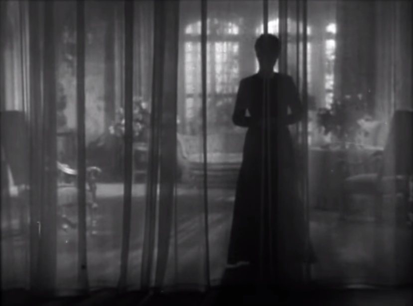 La actriz australiana Judith Anderson en Rebeca